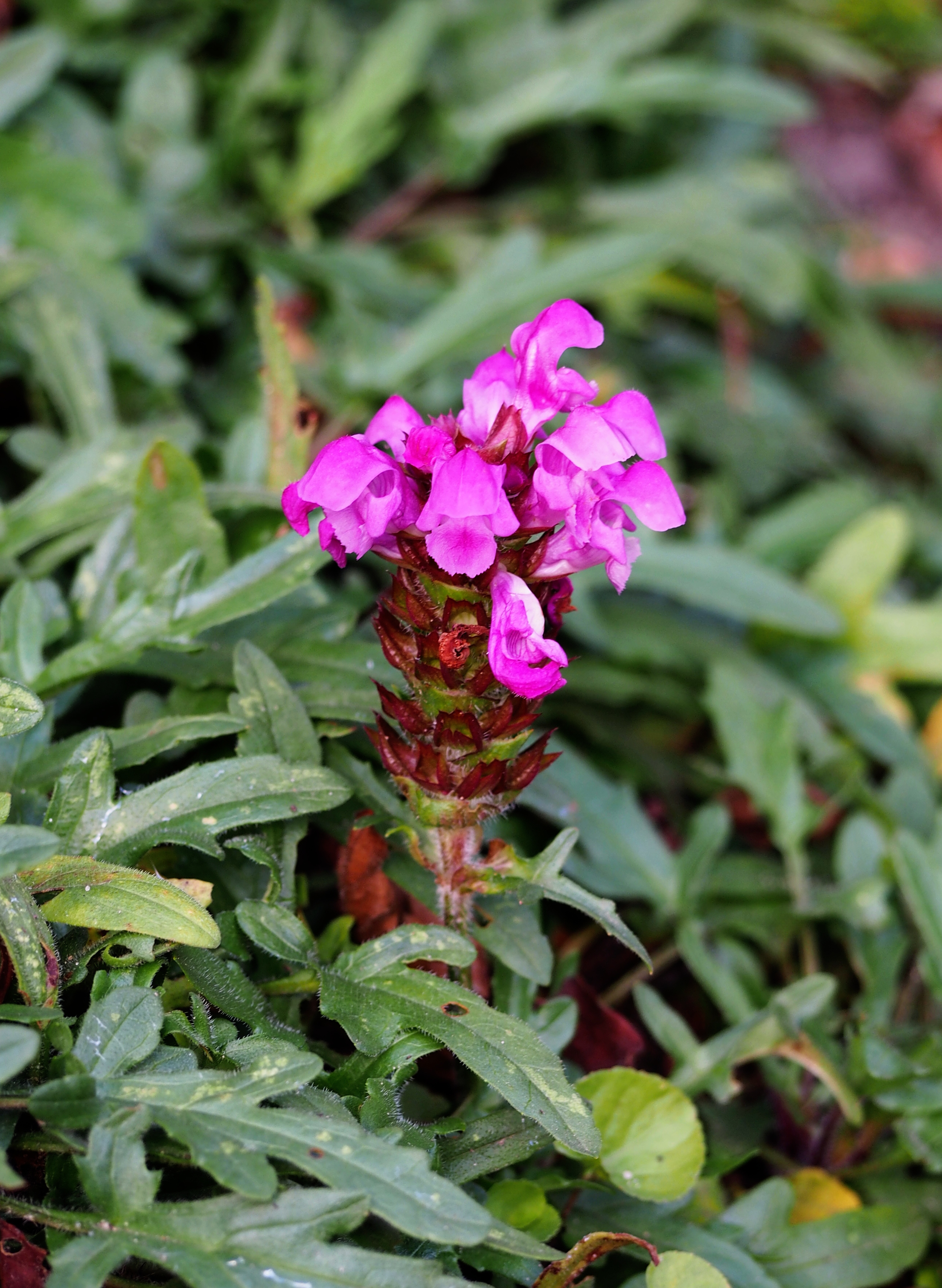 Głowienka Prunella × bicolor, okaz kwitnący, uprawiany. Ogród botaniczny UWr, Wrocław, Polska.